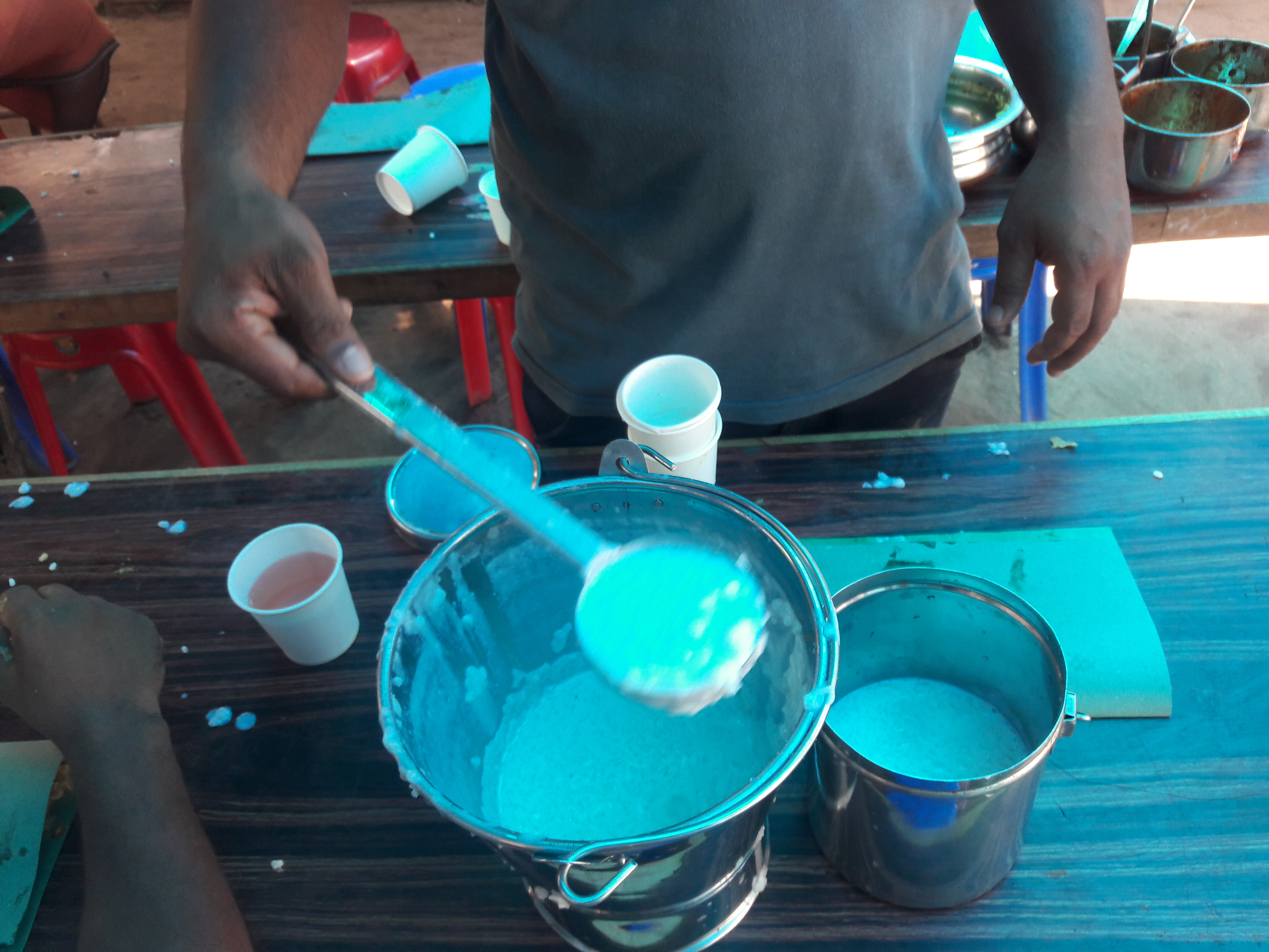 കുടുംബ ക്ഷേത്ര ഉത്സവത്തിലെ ഉച്ച ഭക്ഷണത്തിന് കൂടെ പായസവും.